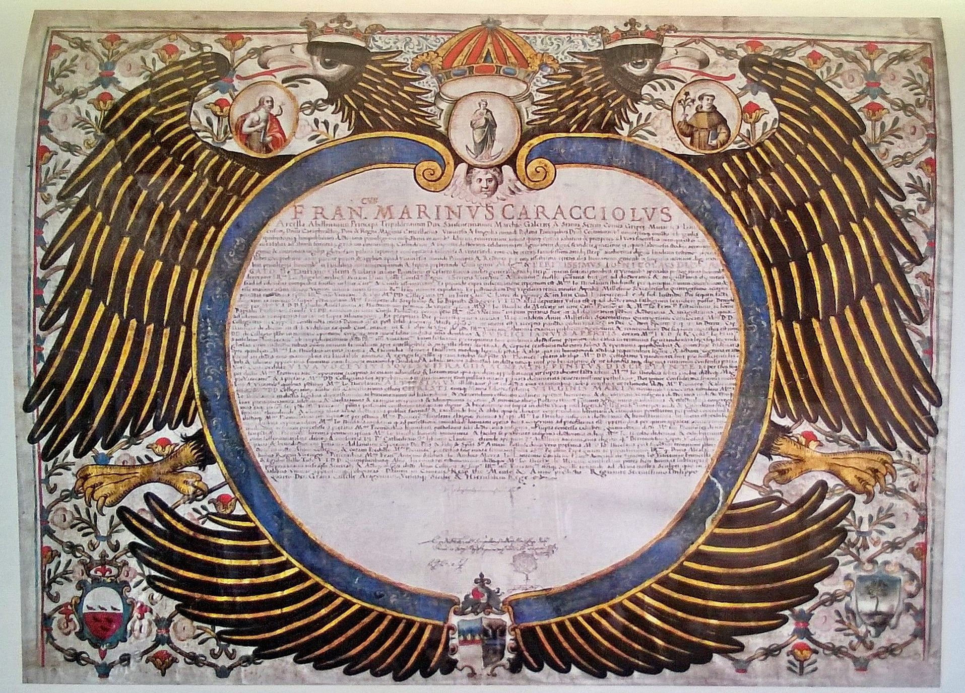 Laurea di Giancola del Mercato . Napoli 1641